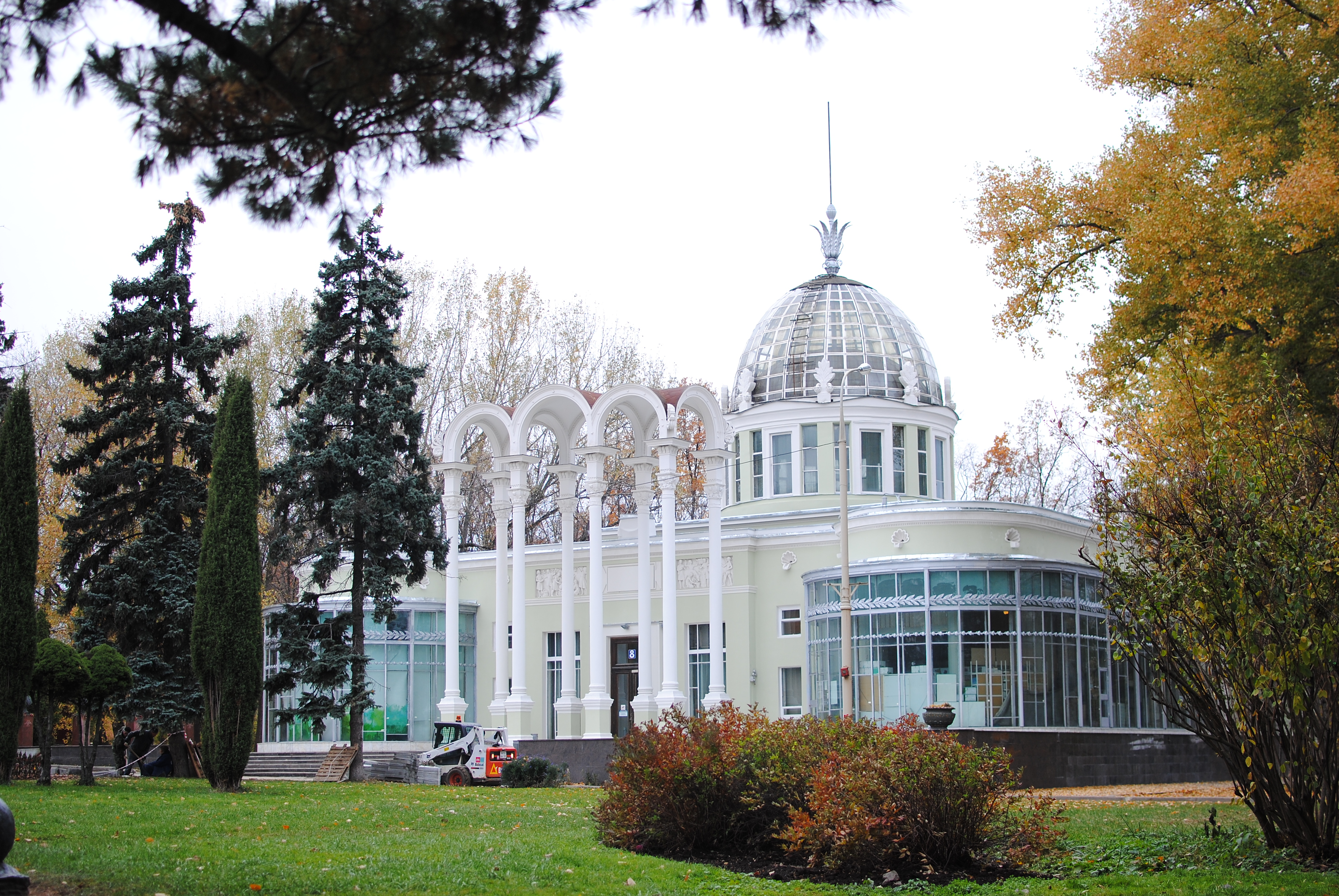 Павильон «Юные натуралисты» (Москва и Московская область, Москва, Мира проспект, 115)